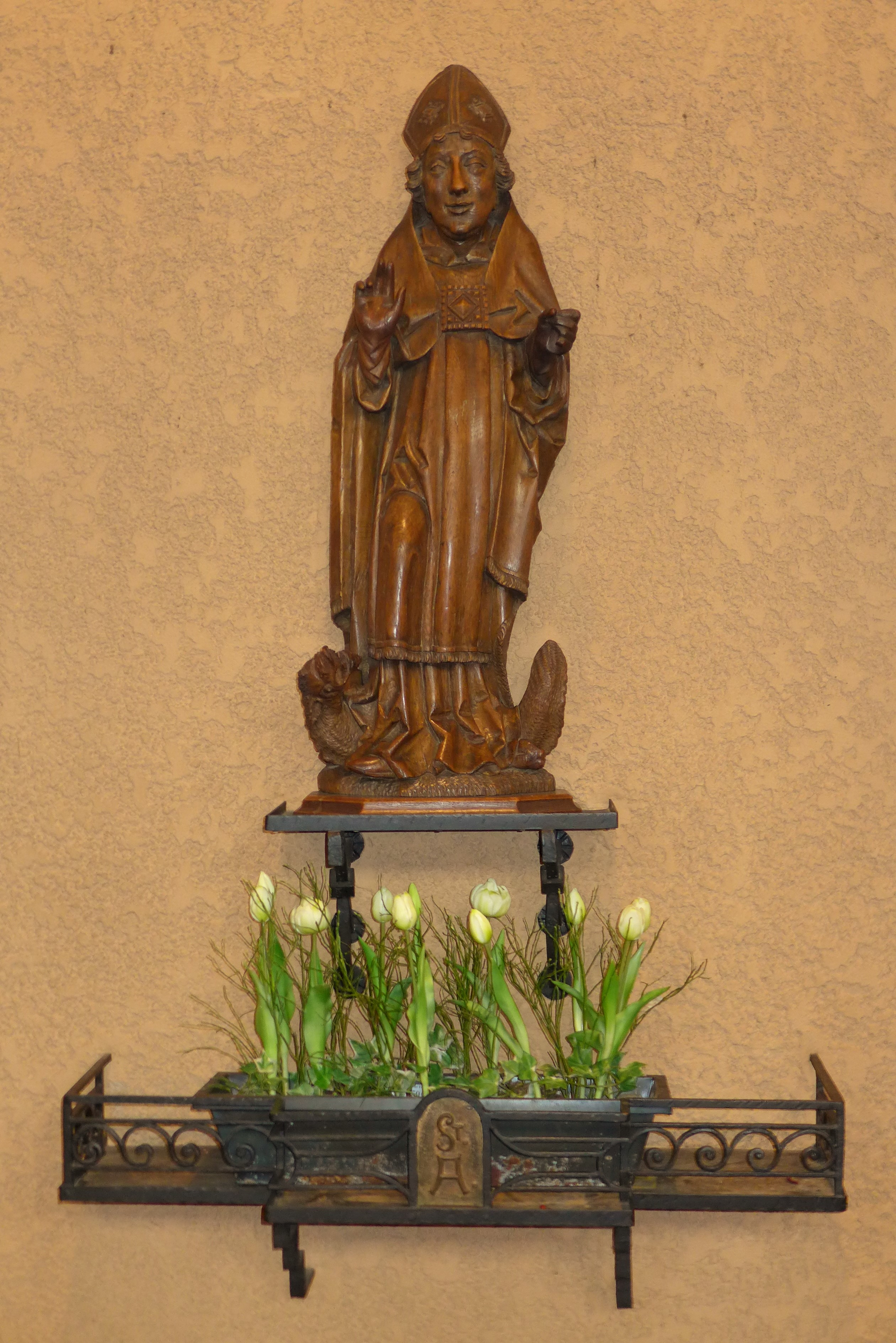 Christkönig-Kirche (Saarbrücken), Heiliger Arnual